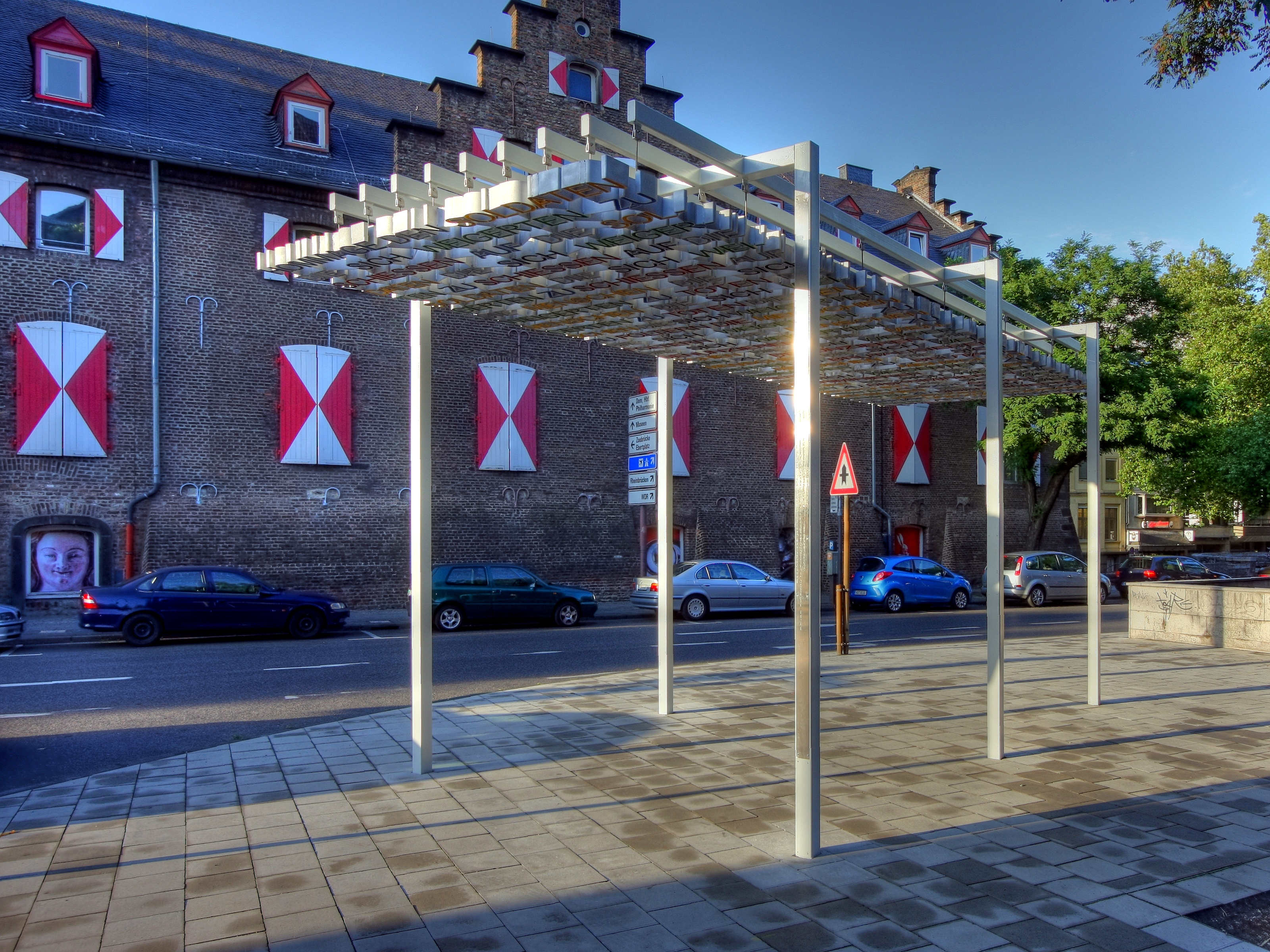 Denkmal für Deserteure und Opfer der NS-Militärjustiz. Standort: Appellhofplatz, Ecke Neven-Dumont-Str./Burgmauer, Köln. Künstler: Ruedi Baur